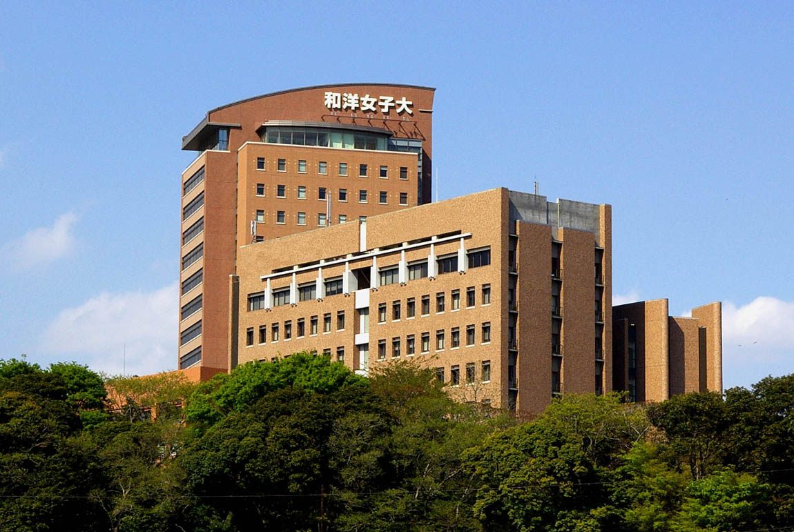 和洋女子大学